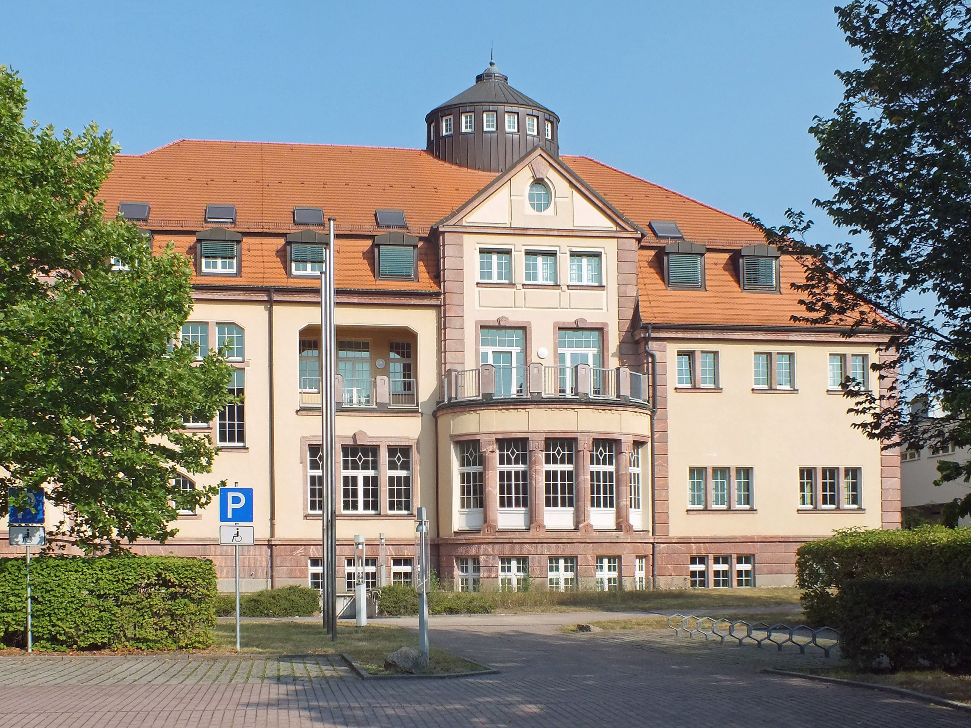 Richterstraße 8 in Leipzig. Sächsisches Finanzgericht, seite zur Springerstraße